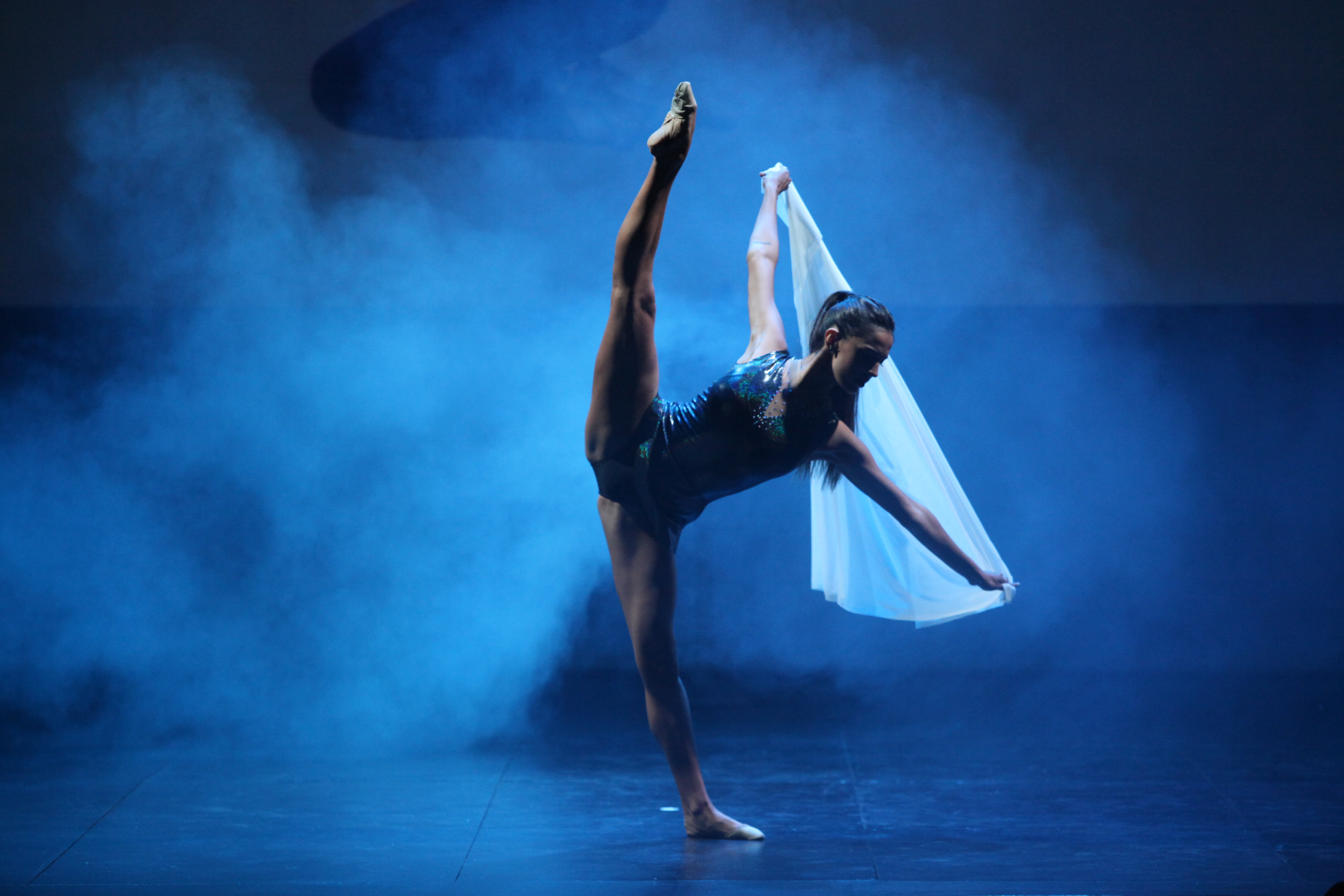 Actuación de la gimnasta rítmica Marina Fernández en la 61 Festa de l'esport en Sabadell el 24 de abril de 2014.